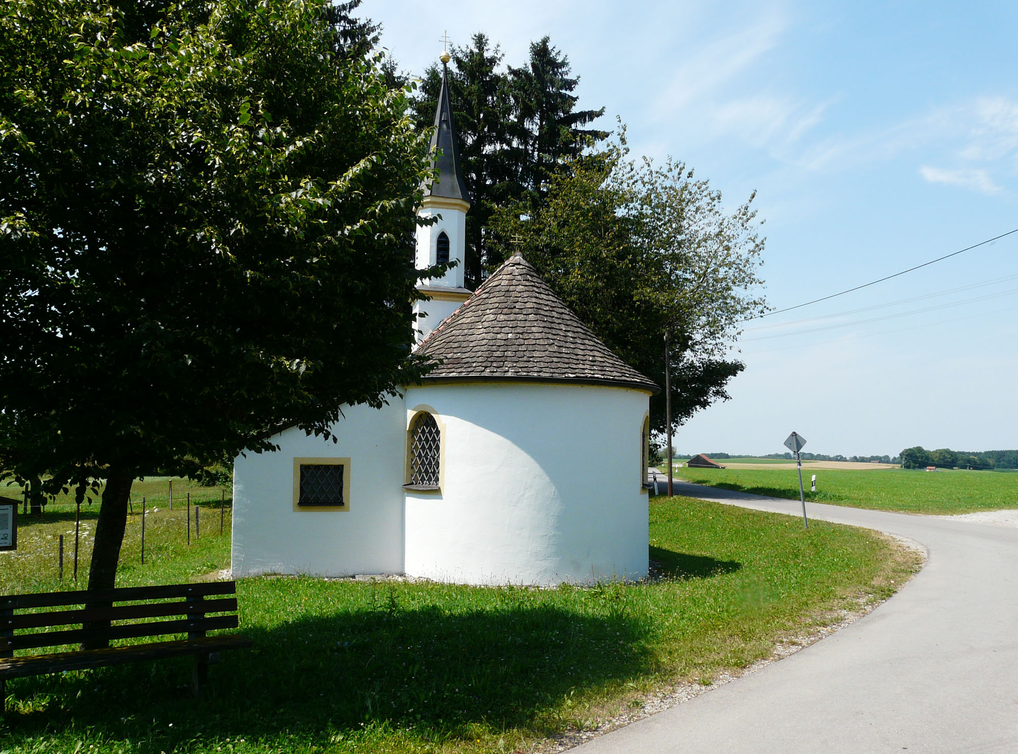 Kapelle in Stoffen, Pürgen